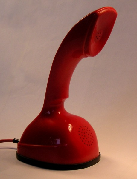 Ericofon "Cobra" von 1953